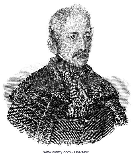 Mednyánszky Alajos portréja 1784 - 1844